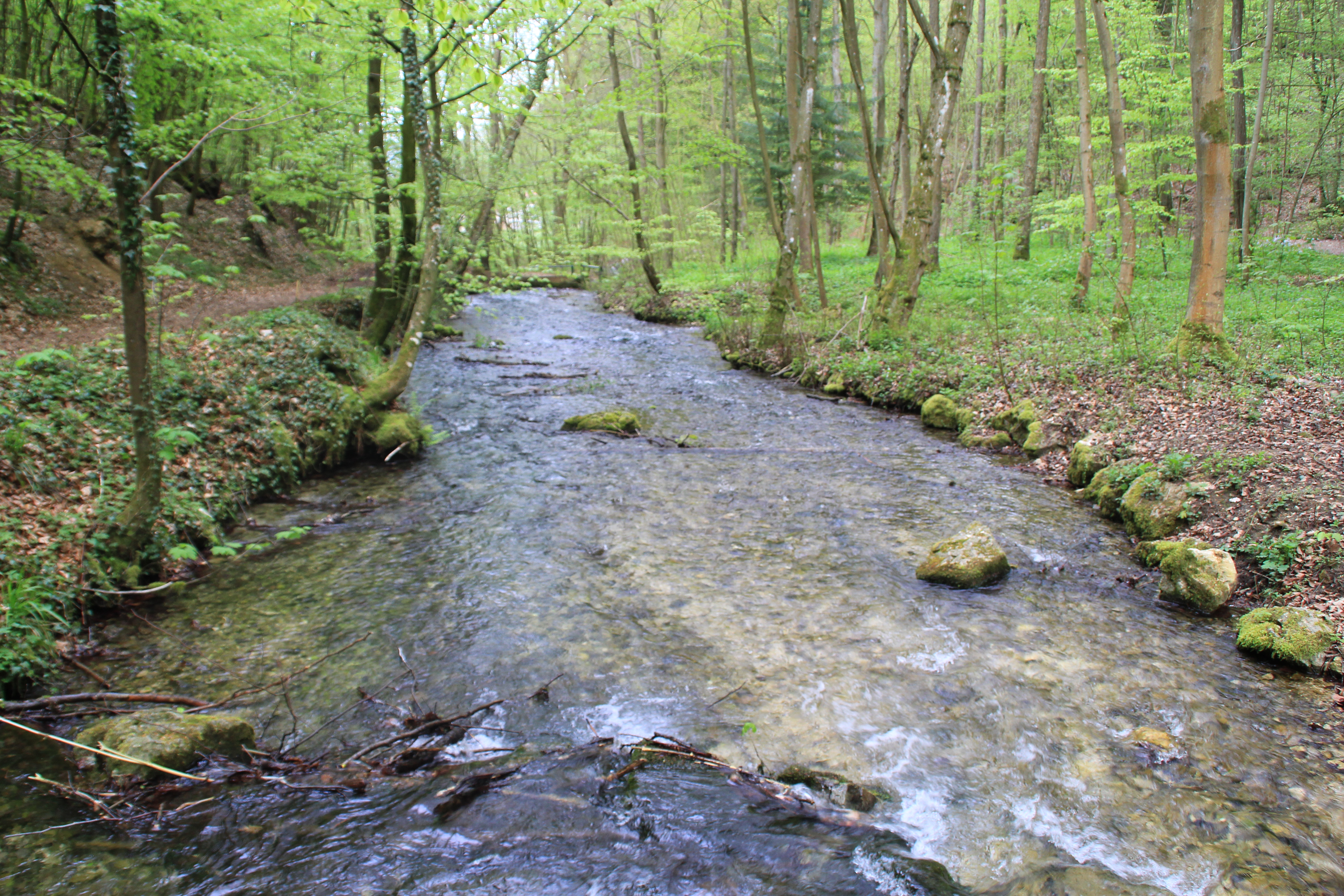 Der Weiße Kocher kurz nach seinem Ursprung